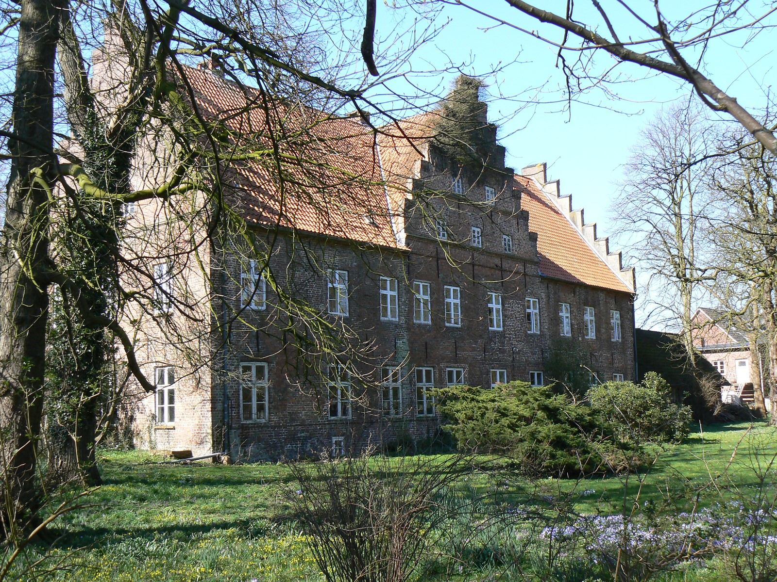 Schloss vor Husum. Kavaliershaus für die Besucher des Schlosses. Erbaut um 1630. Von 1865-1950 im Privatbesitz der Familie Tönnies. Hier lebte auch Ferdinand Tönnies - der Begründer der deutschen Soziologie.